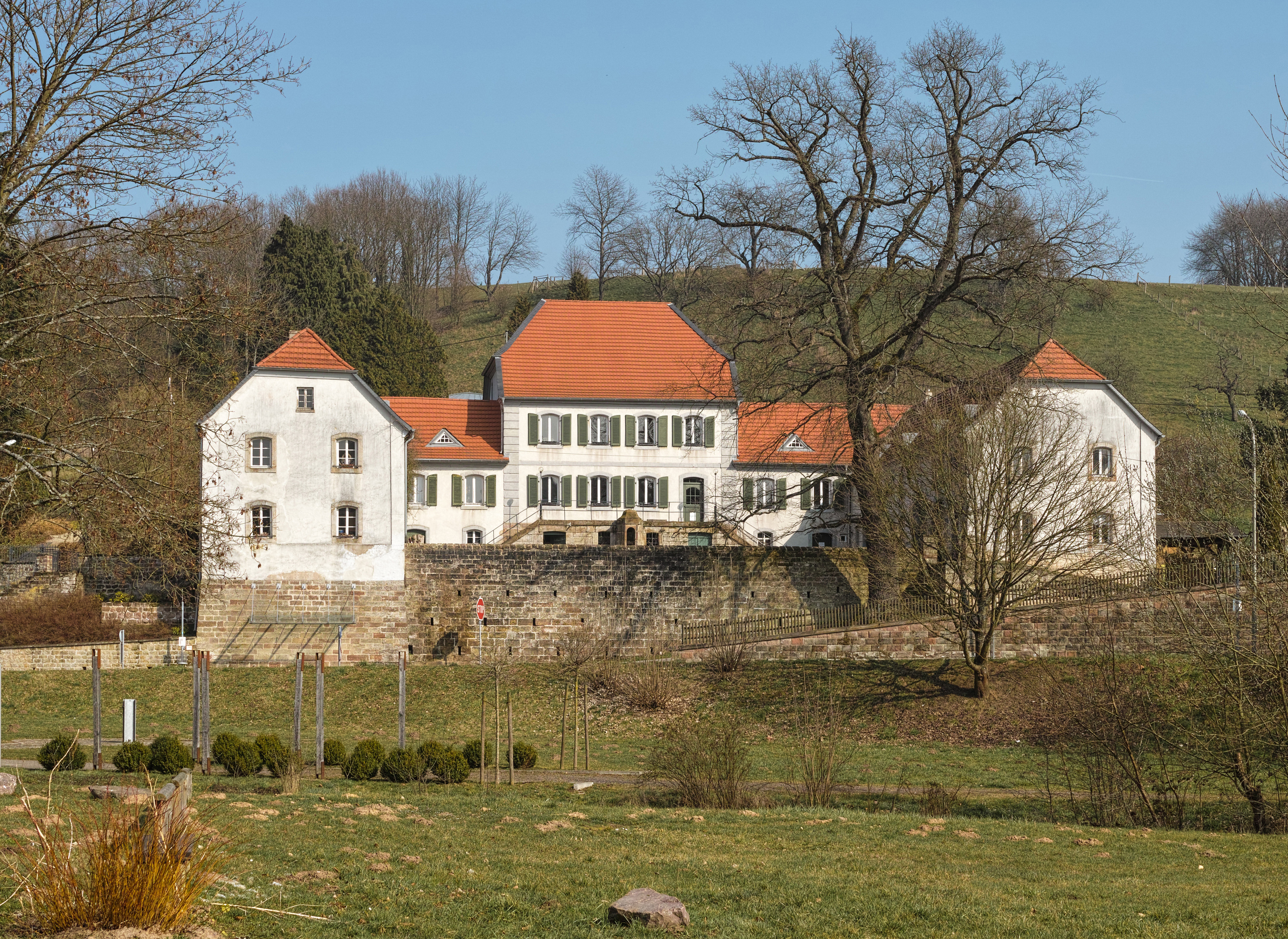 Das 1769 erbaute Jagdschloss Karlsbrunn.